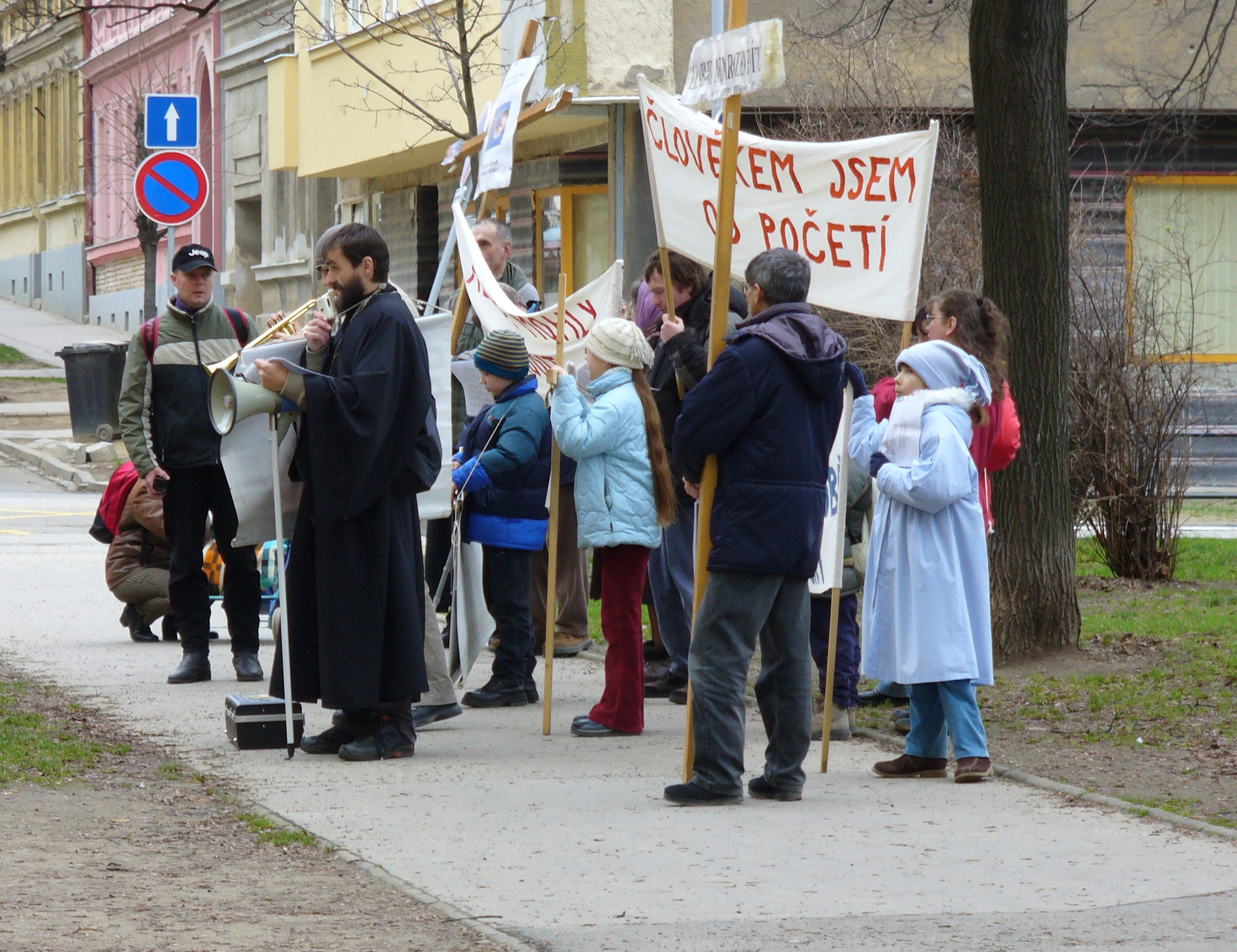 Demonstrace proti umělým potratům před porodnicí na Obilním trhu